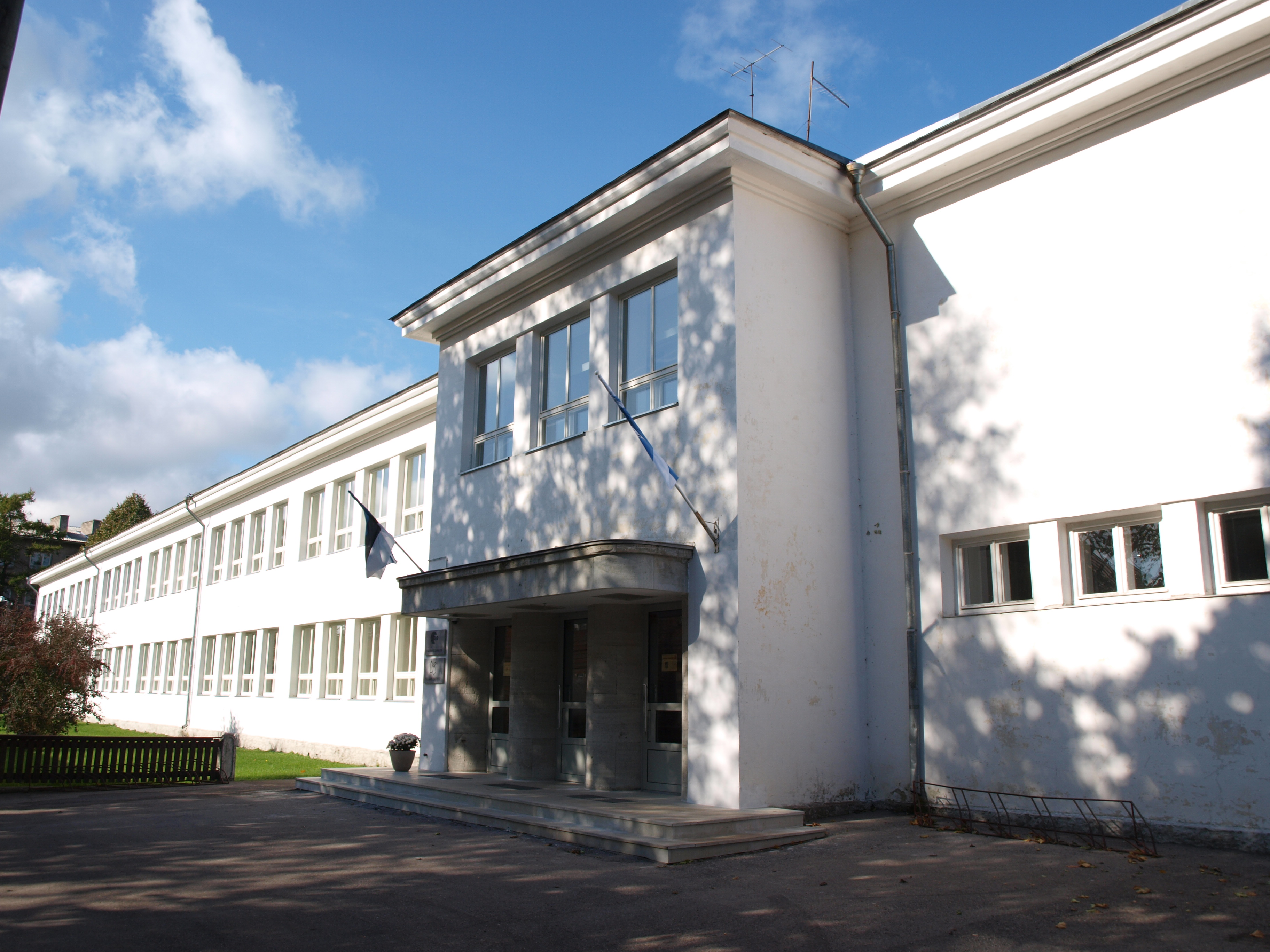 Selles majas tegutses Kuressaare linnakool. Hetkel asub seal Kuressaare Täiskasvanute Gümnaasium.